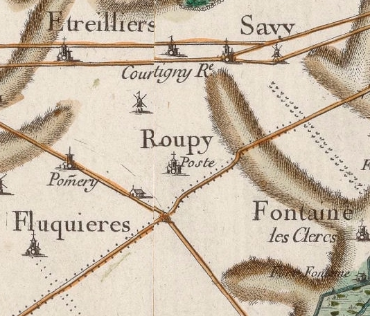 Carte de Cassini